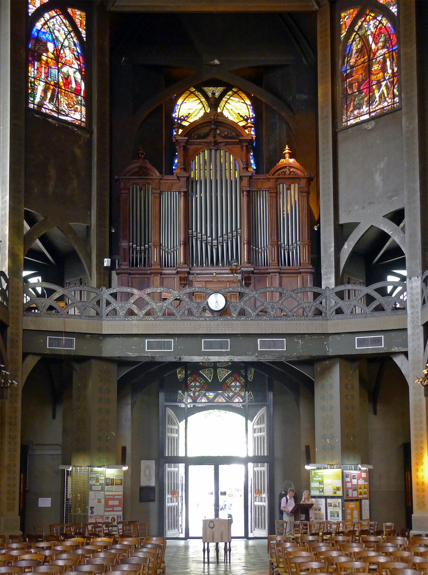 Église Saint-Jean de Montmartre (orgue) - Paris XVIII